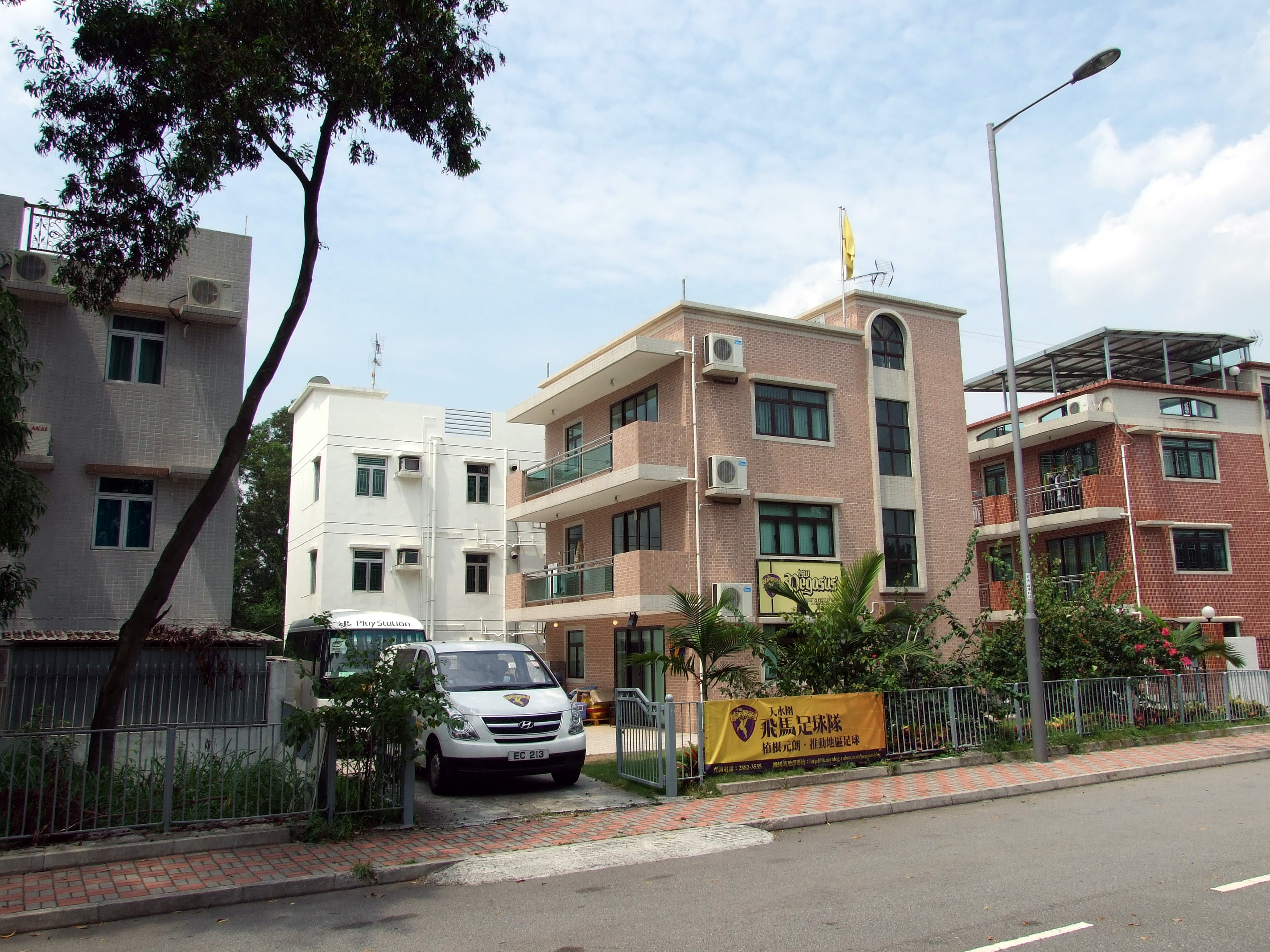 中文（香港）: 天水圍飛馬位於元朗沙江圍的基地